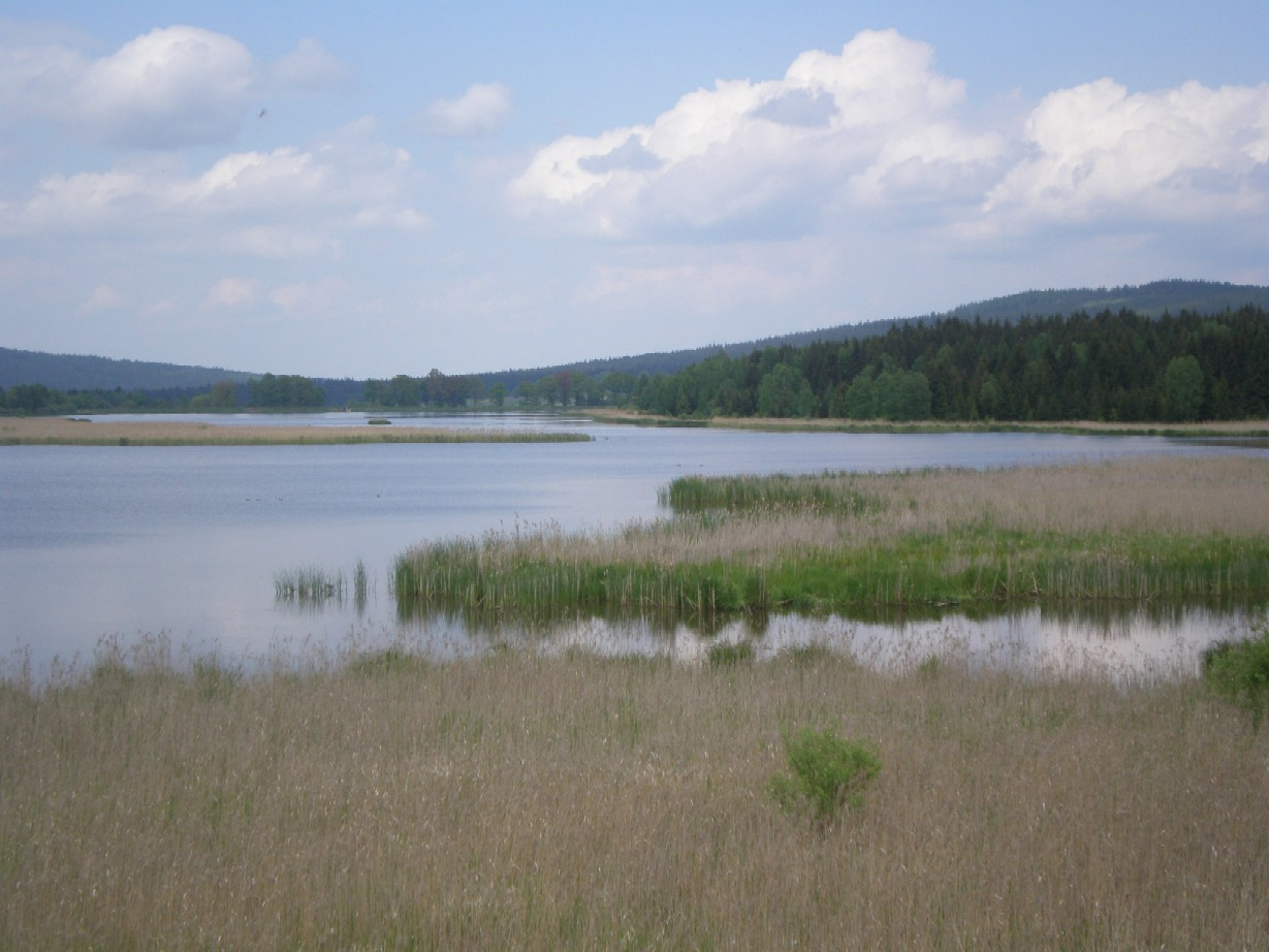 Dolejší Padrťský rybník v Brdech. Vpravo v pozadí vrch Kočka (789 m)